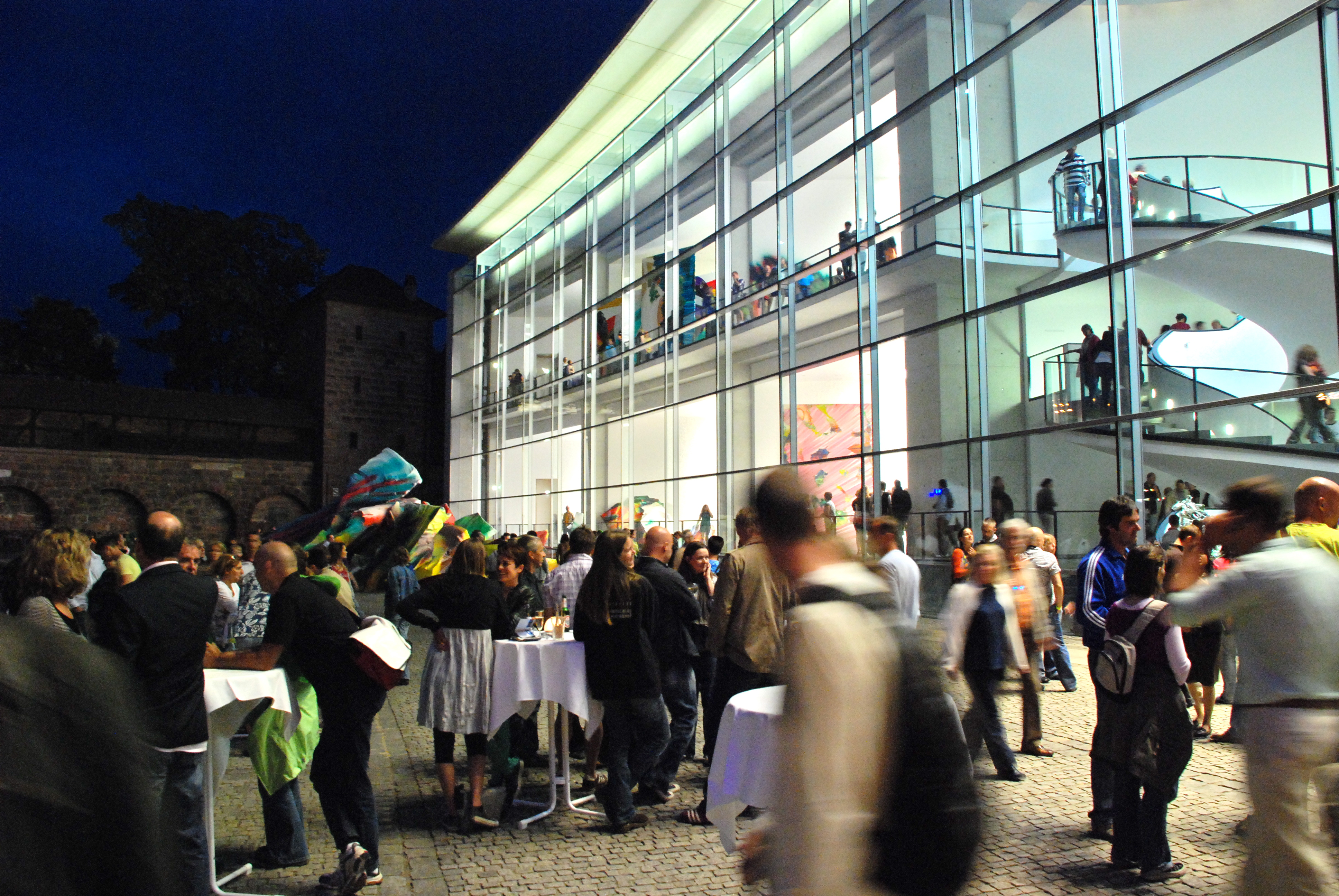 Blaue Nacht 2009 - 44